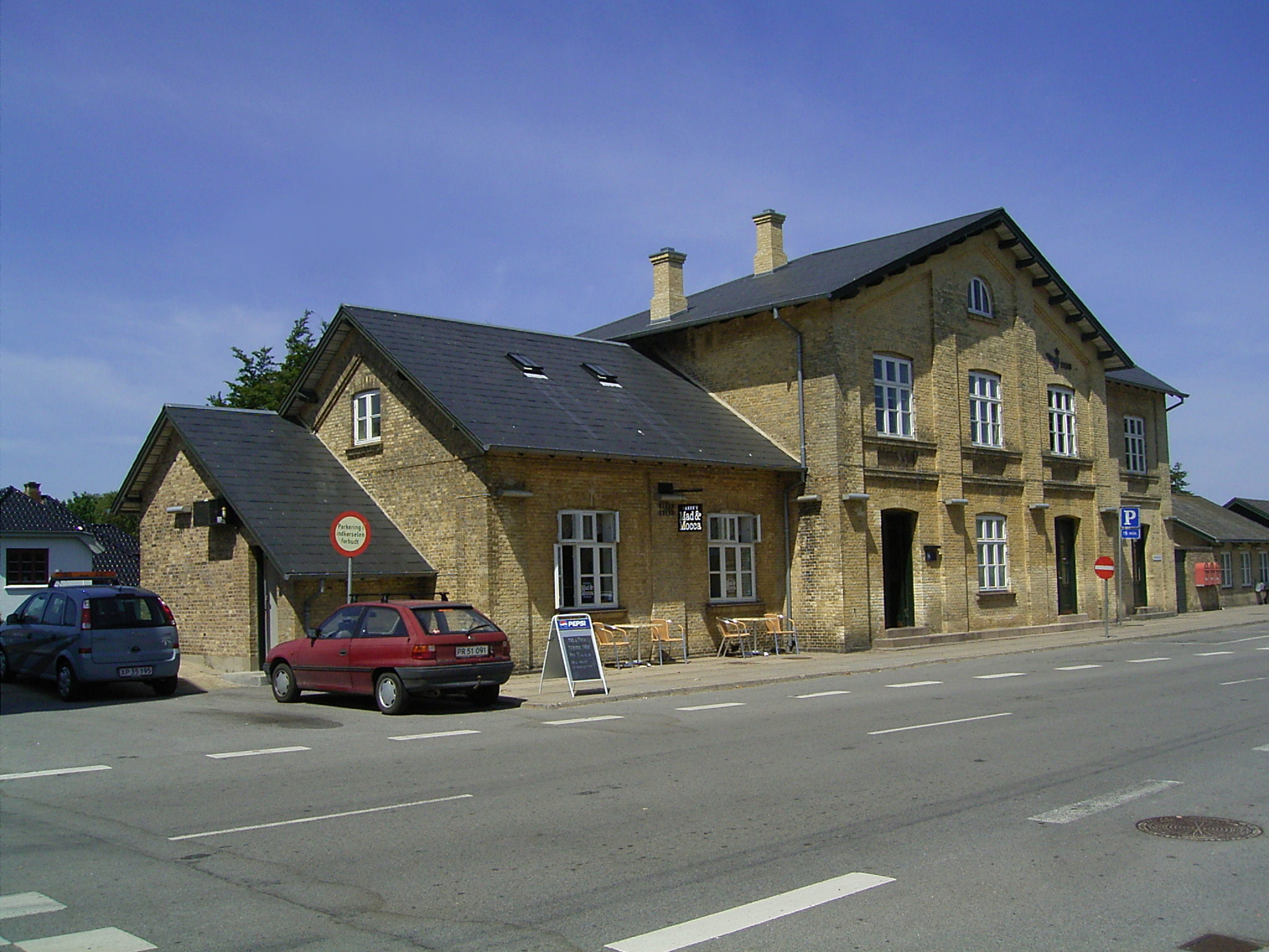 9520 Skørping in Denmark